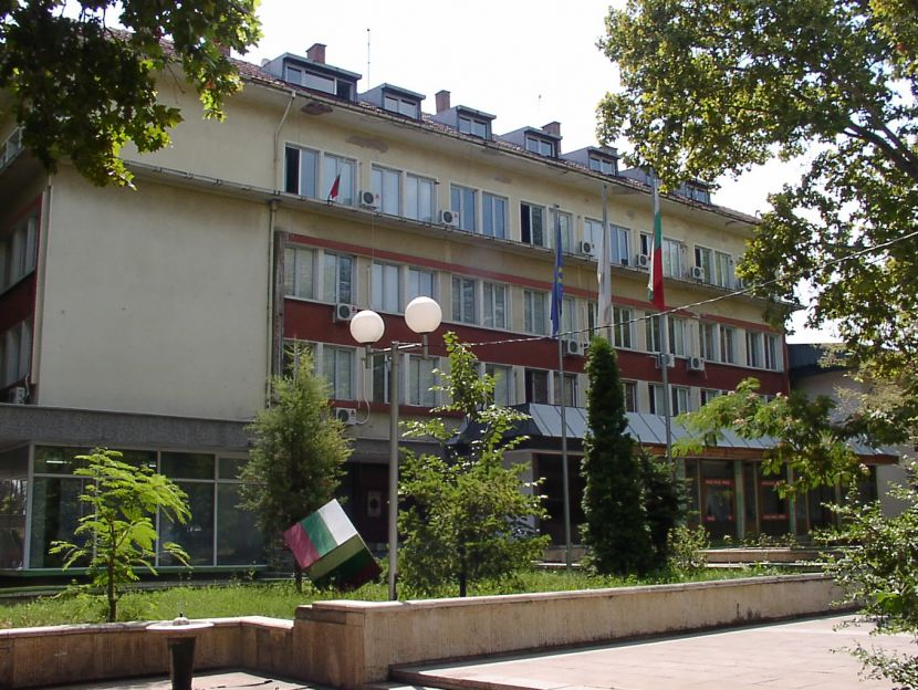 сградата на Община Долна Митрополия